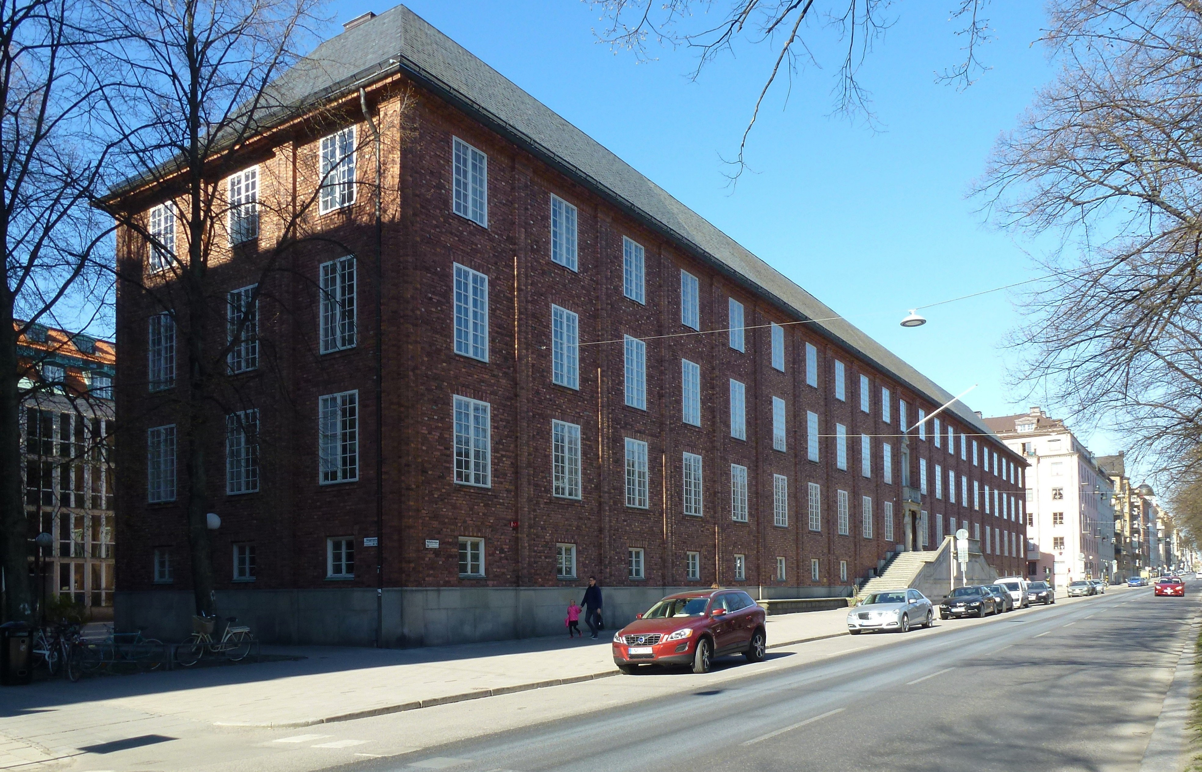 Patent- och registreringsverket, Valhallavägen